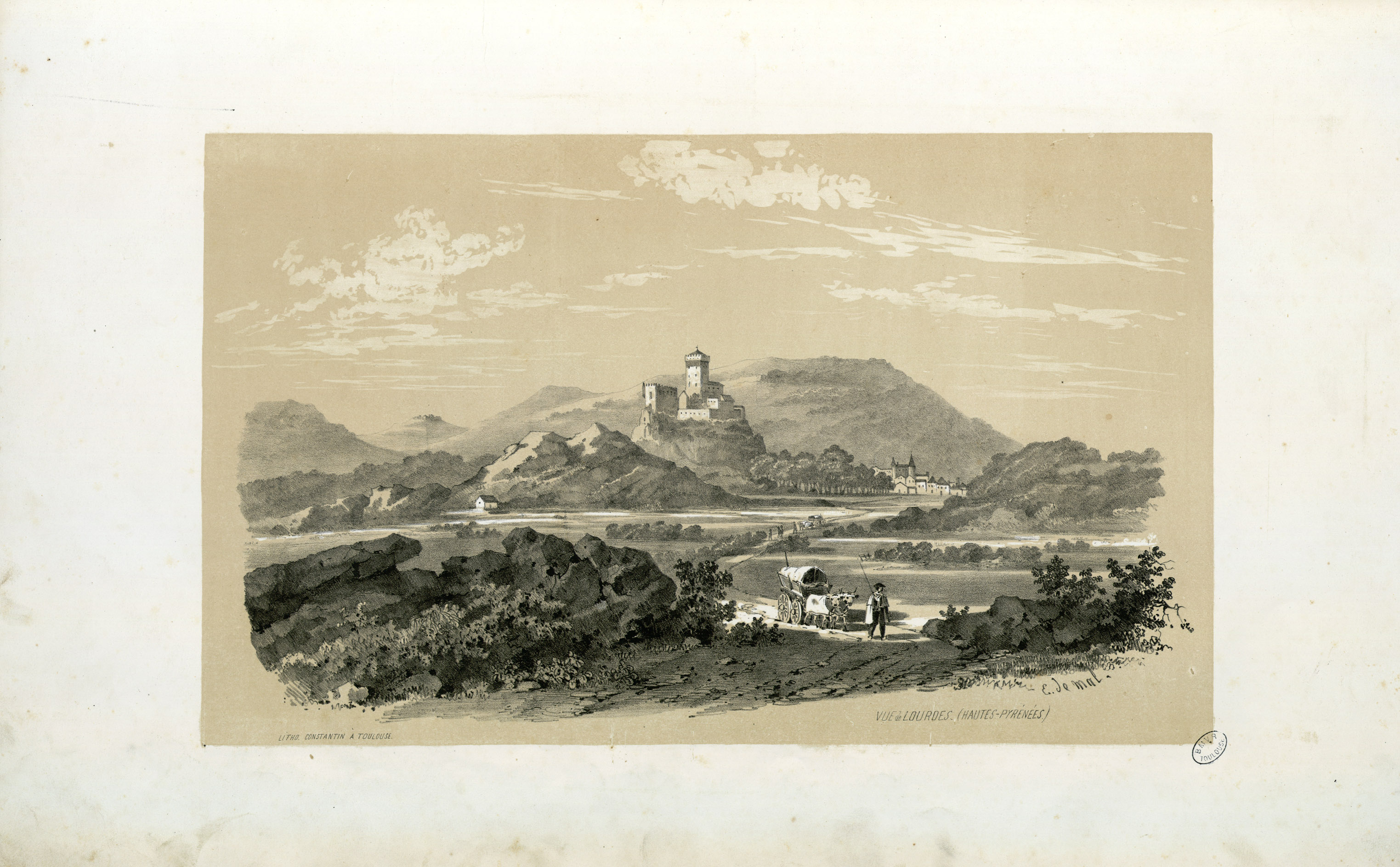 Fait partie d'un recueil de 15 planches lithographiées en camaïeu avec titre lithographié Ancely, René (1876 - 1966). Possesseur